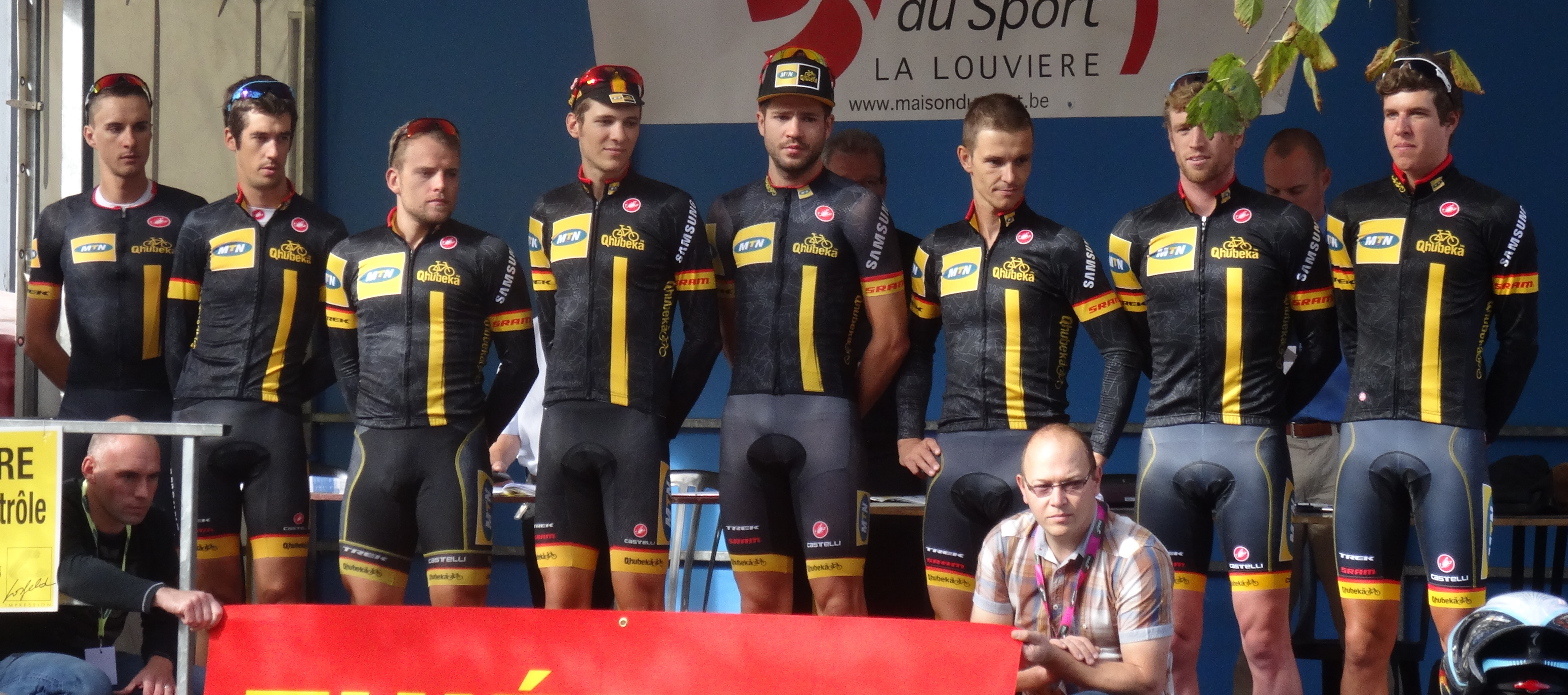 Reportage photographique réalisé le jeudi 2 octobre à l'occasion du départ de la première étape de l'Eurométropole Tour 2014 à La Louvière, Belgique.